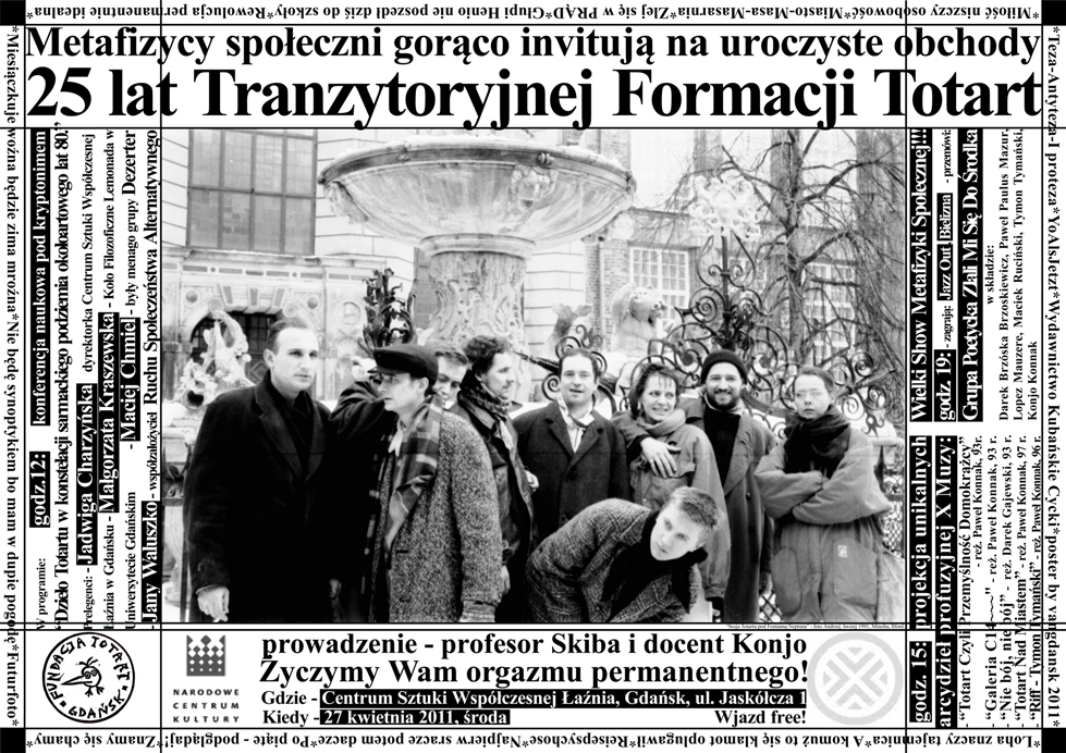 "25 lat Tranzytoryjnej Formacji Totart" - na zdjęciu od lewej: Dariusz Brzóska Brzóskiewicz, Sławek Ozi Żamojda, Paweł Paulus Mazur, Andrzej Awsiej, Paweł Konjo Konnak, Ela Bumbul, Zbigniew Sajnóg, Joanna Kabala; poniżej: Robert Banaszczyk.